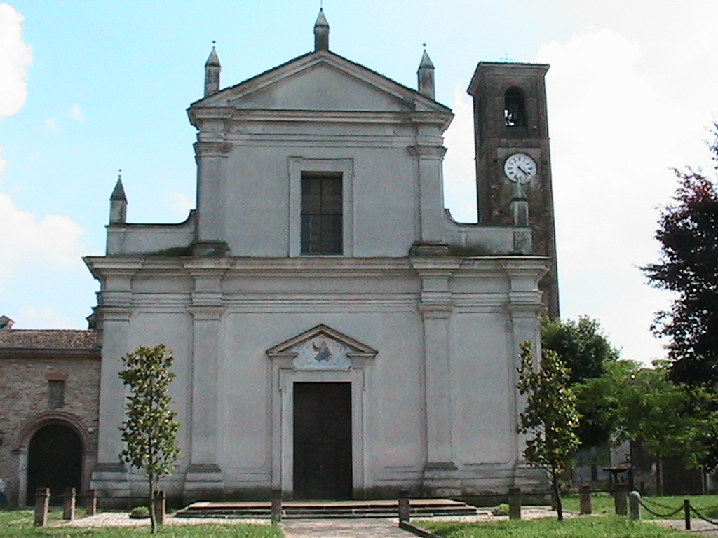 Villarocca - Chiesa di San Leonardo